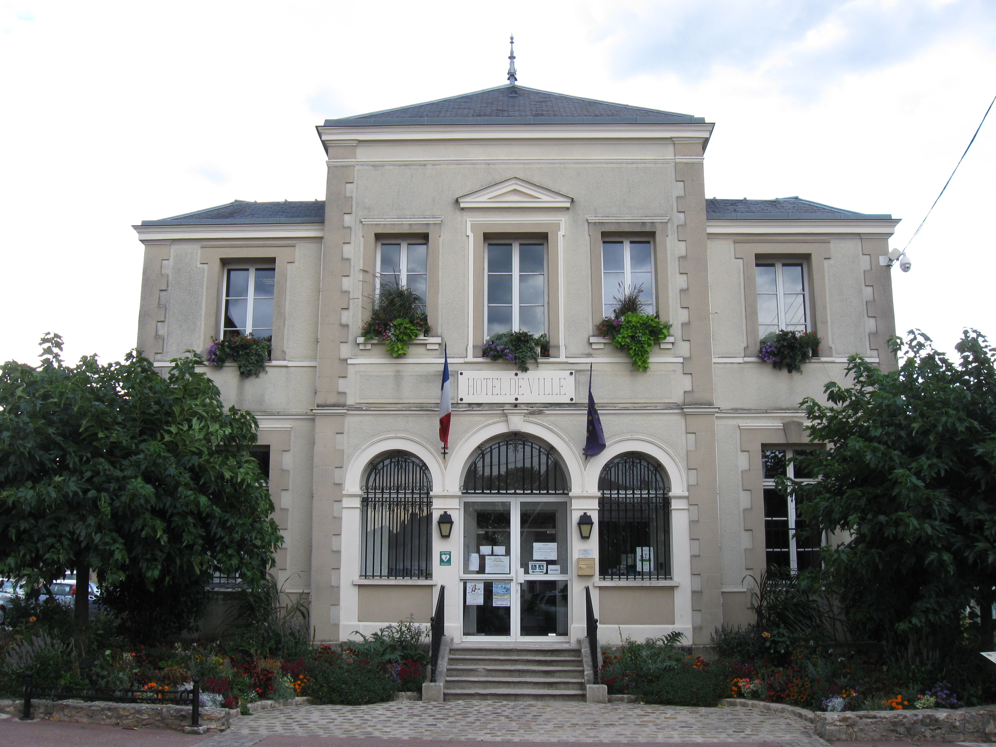 Mairie du Châtelet-en-Brie. (Seine-et-Marne, région Île-de-France).